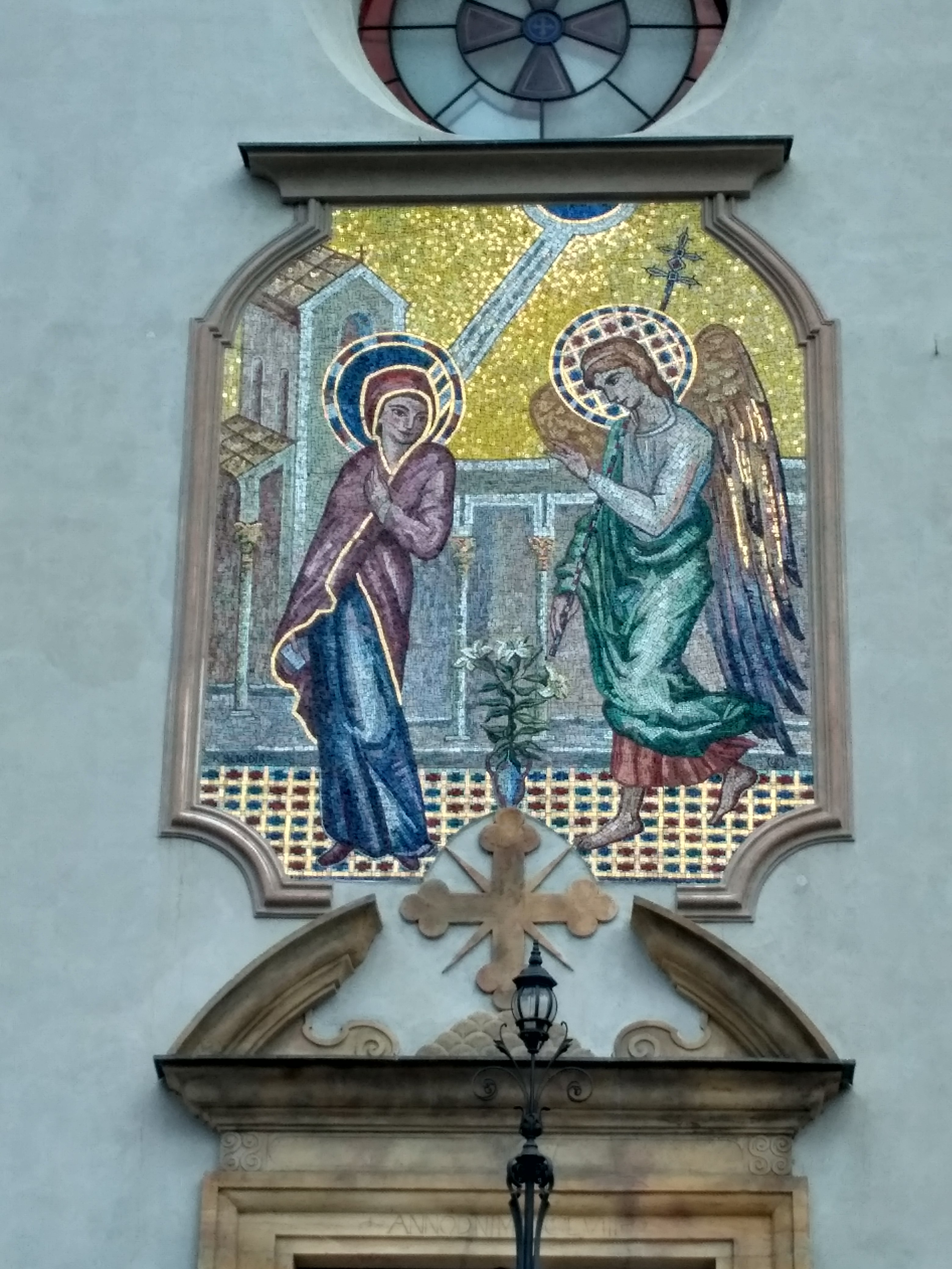 Mozaika zvěstování Páně - Kapucíni Olomouc